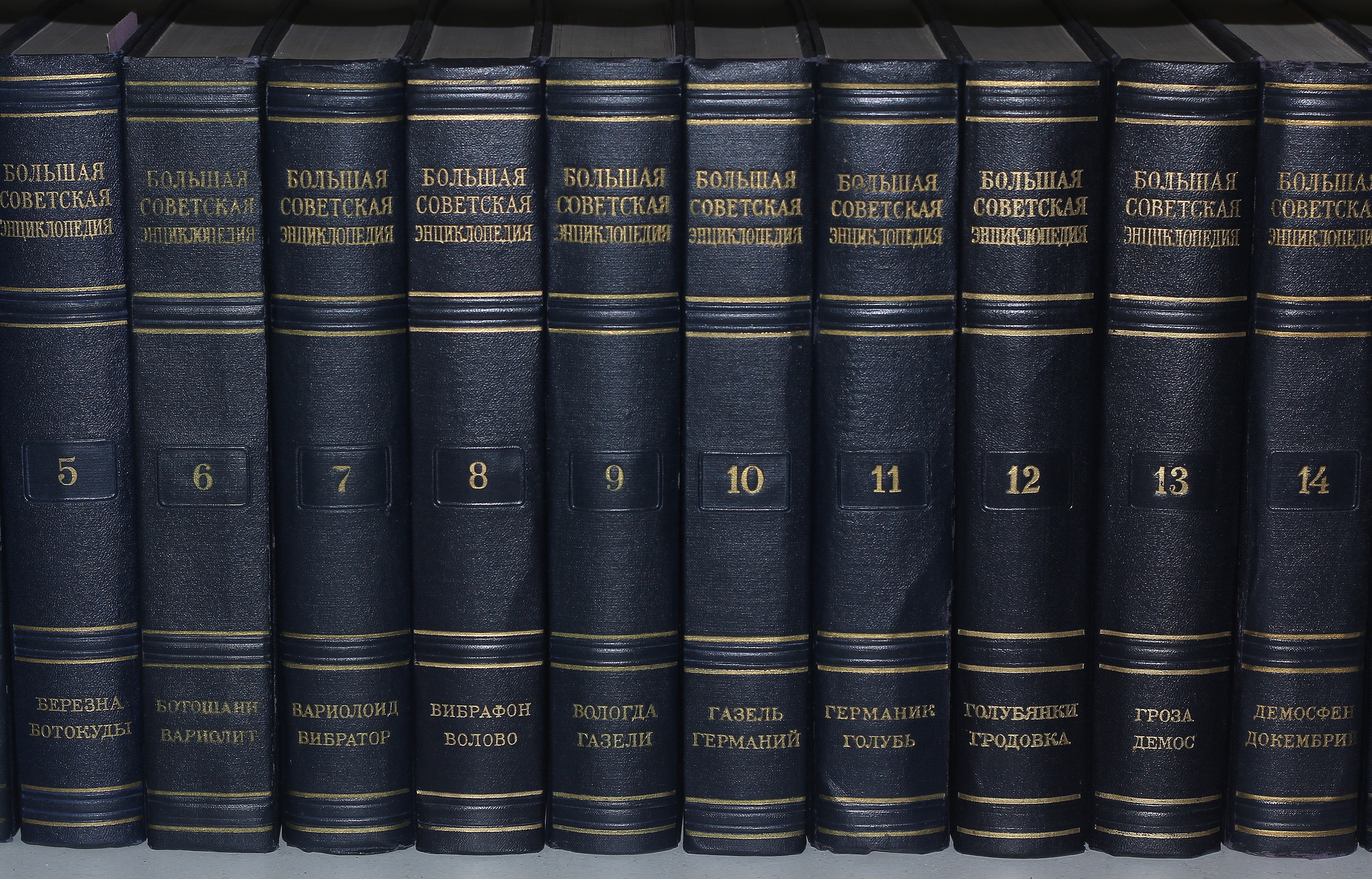 Большая советская энциклопедия второе издание